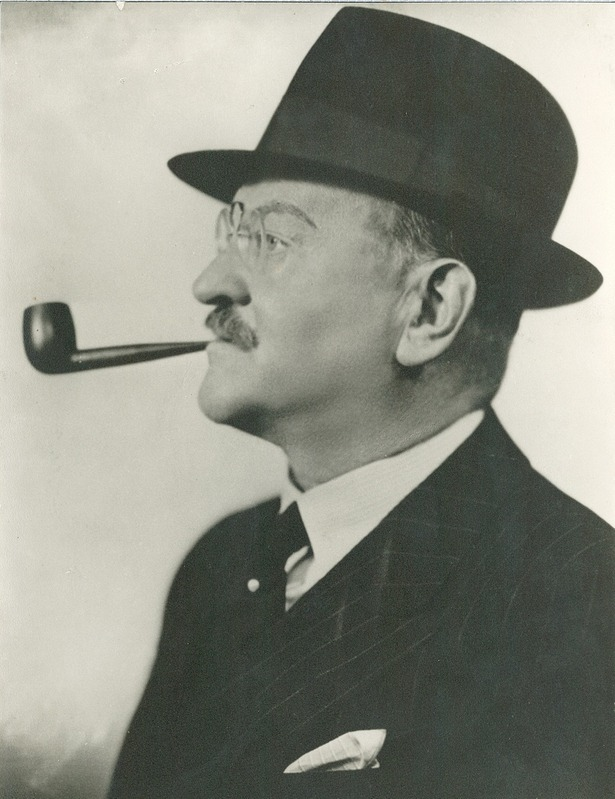 Portrett av Halfdan Christensen.